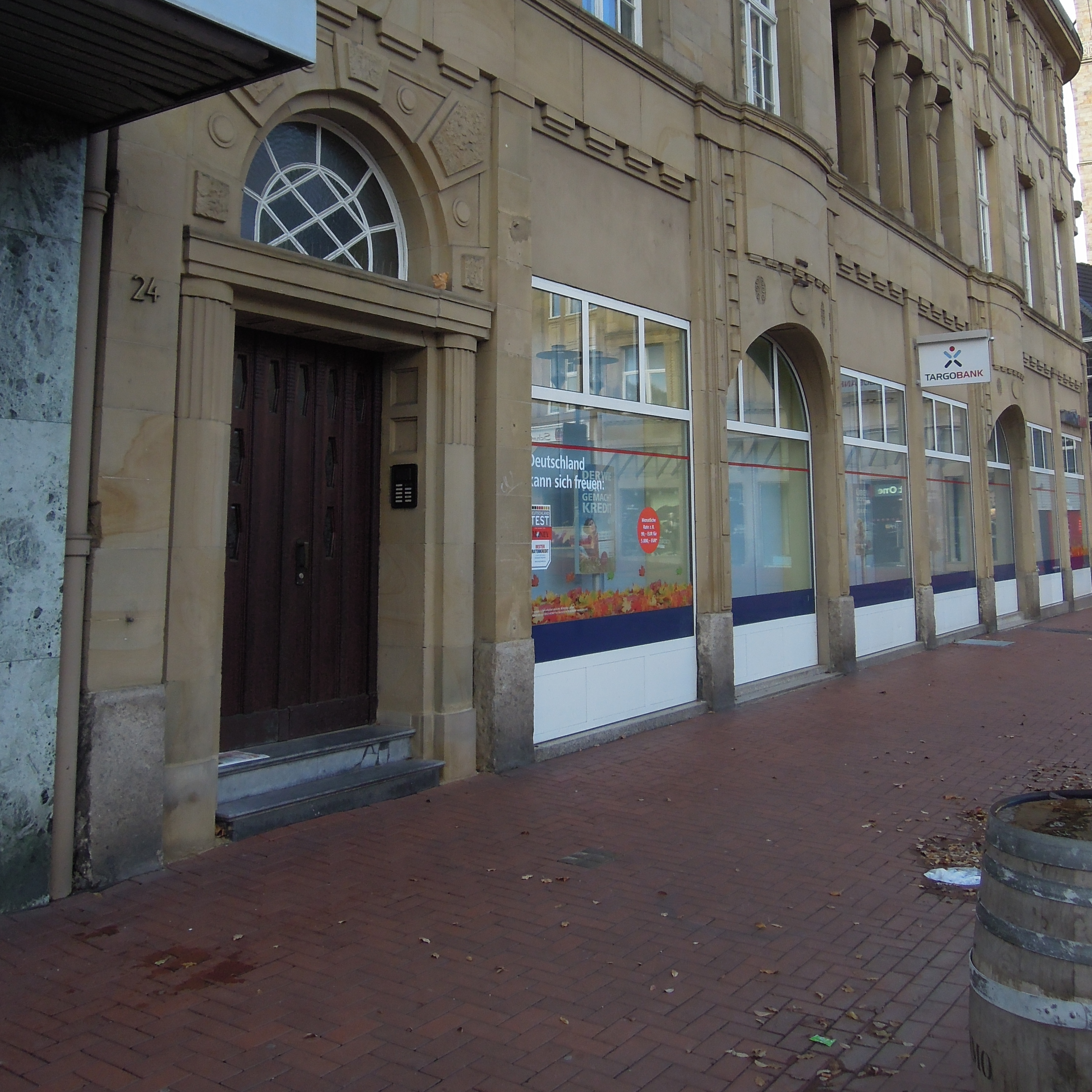 Stolpersteinlage Am Markt 24